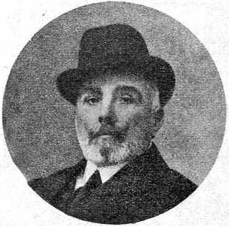 Constantino Candeira González, fotografía en Vida Gallega 1909